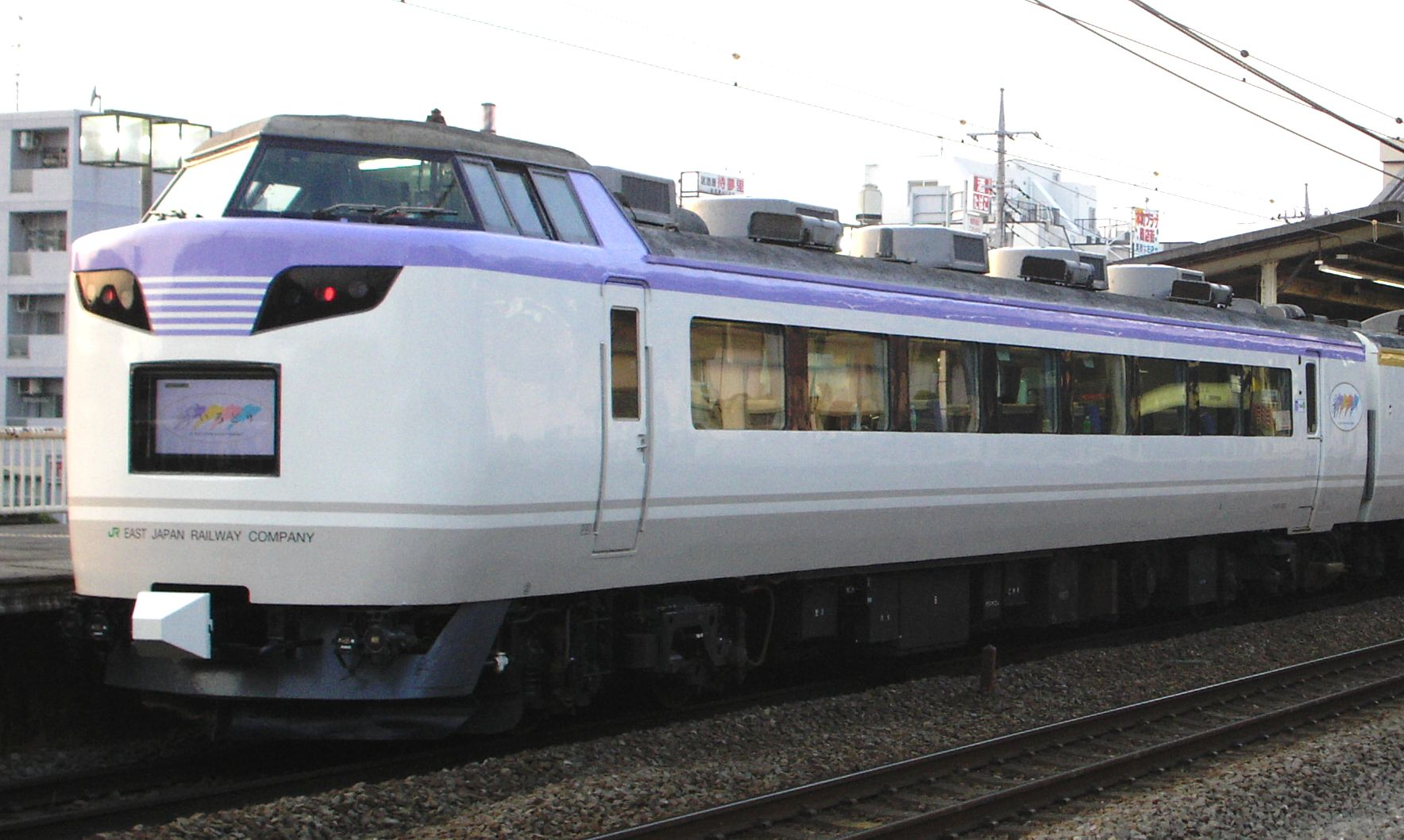 JR東日本 485系1500番台「彩（いろどり）」